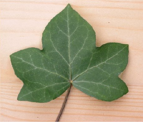 Hedera helix leaf